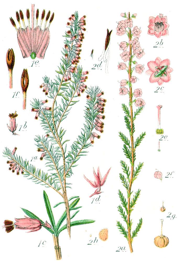 1. Erica carnea L. , nom. cons. 2. Calluna vulgaris (L.) Hull Original Caption 1. Bergheide, Erica carnea 2. Gemeine Heide, Calluna vulgaris